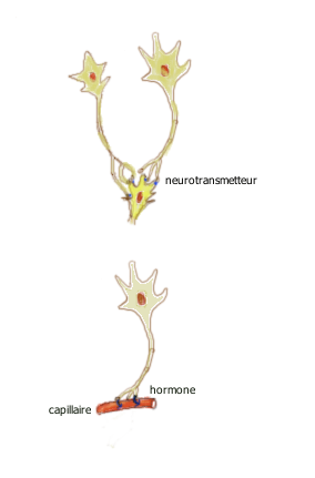 Les neurones secrètent un neurotransmetteur dans la synapse ou des hormones dans le flux sanguin.